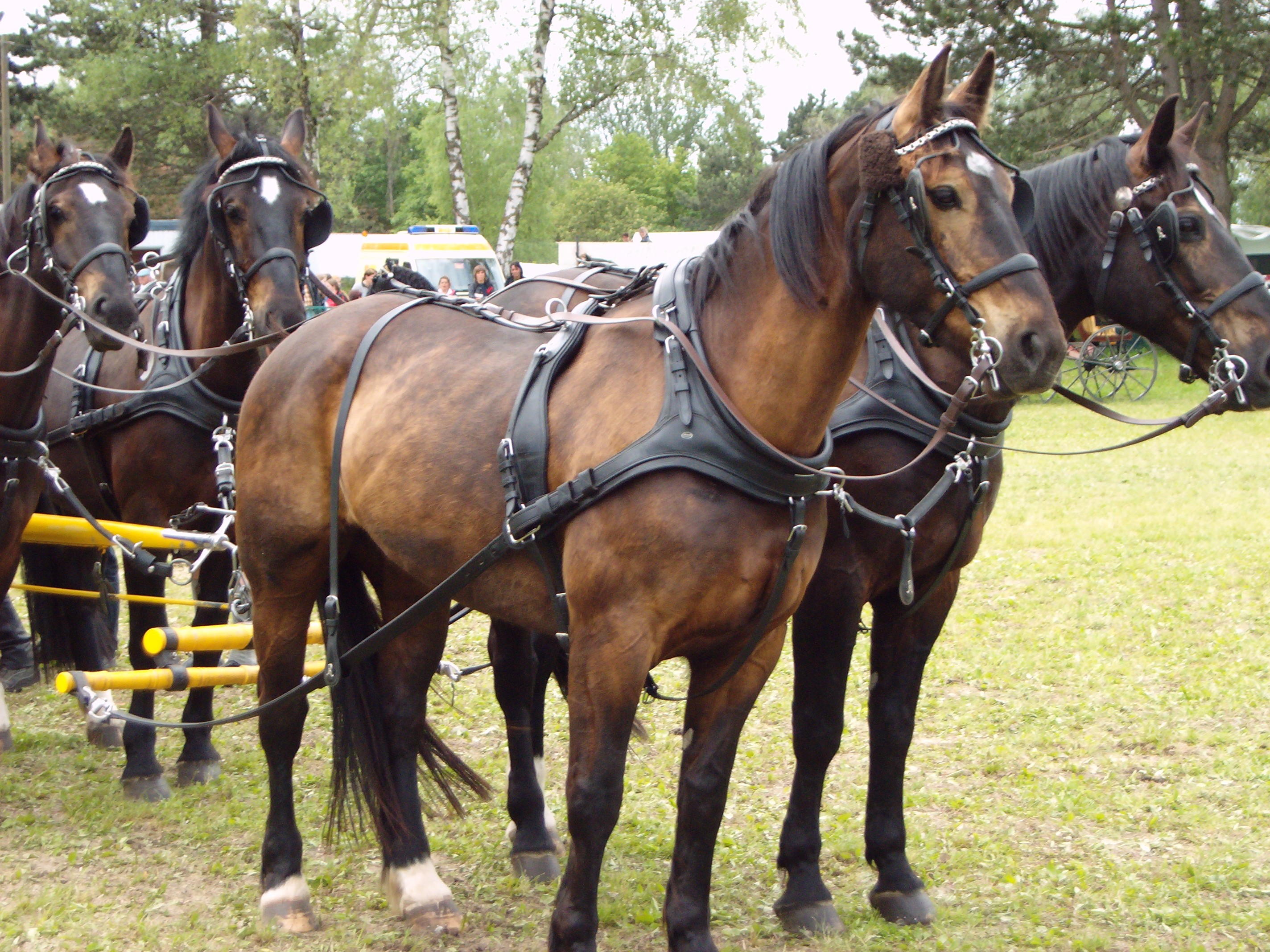 Schweres Warmblut mit Marthonkumt (Französisches Kumt) Auf der rechten Seite der Wallach Hero (* 28.05.2001 - Stockmaß 162 cm), links der Wallach Hektor (geb. 25.07.2001 - Stockmaß 157 cm), beide Oldenburg-Ostfriesländisches Schweres Warmblut von Herold. Pferde vor der "Europakutsche" von Christine und Jürgen Reimer, fotografiert in München auf der Pferd International 2006.